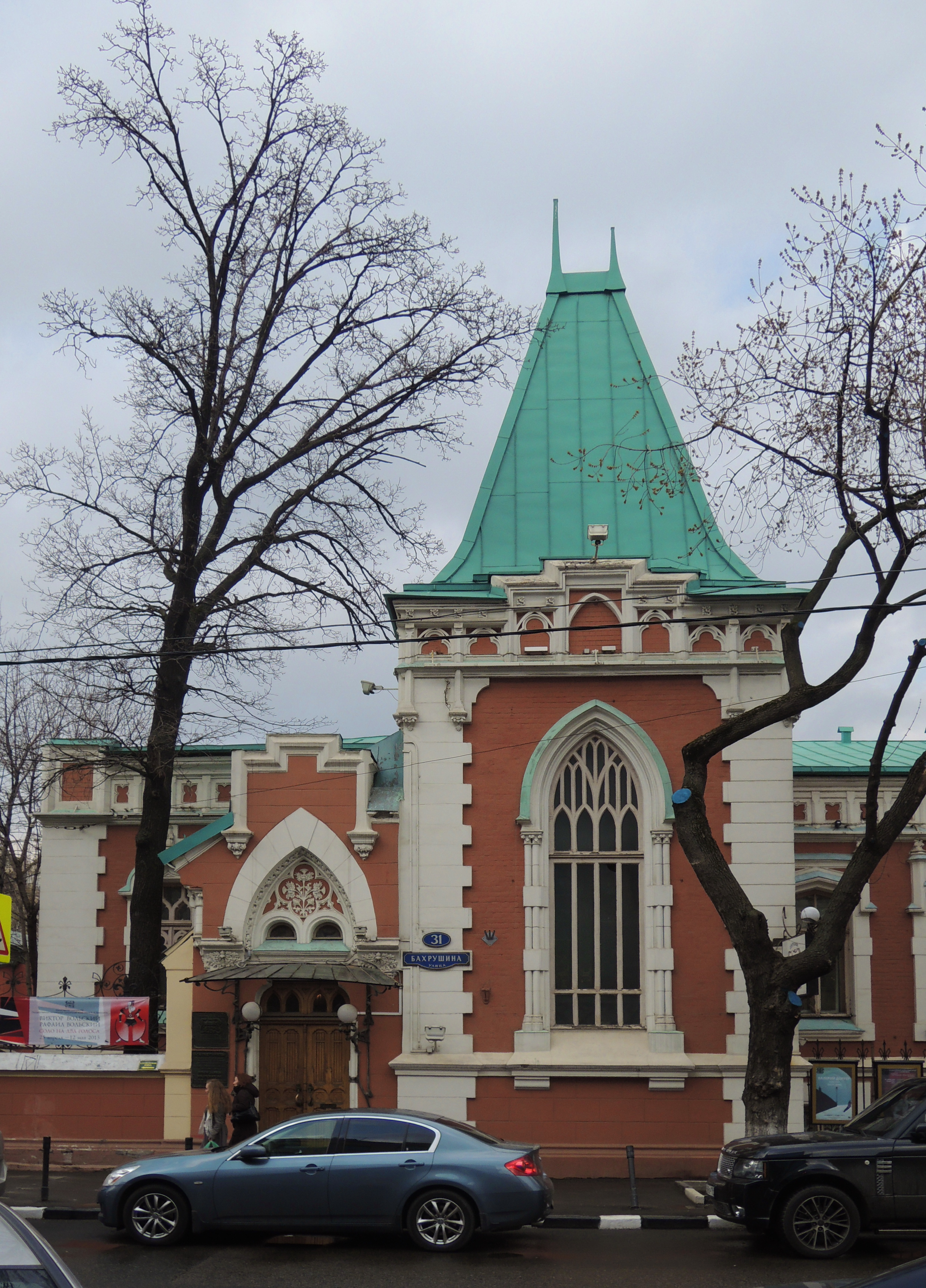 Бахрушинский музей